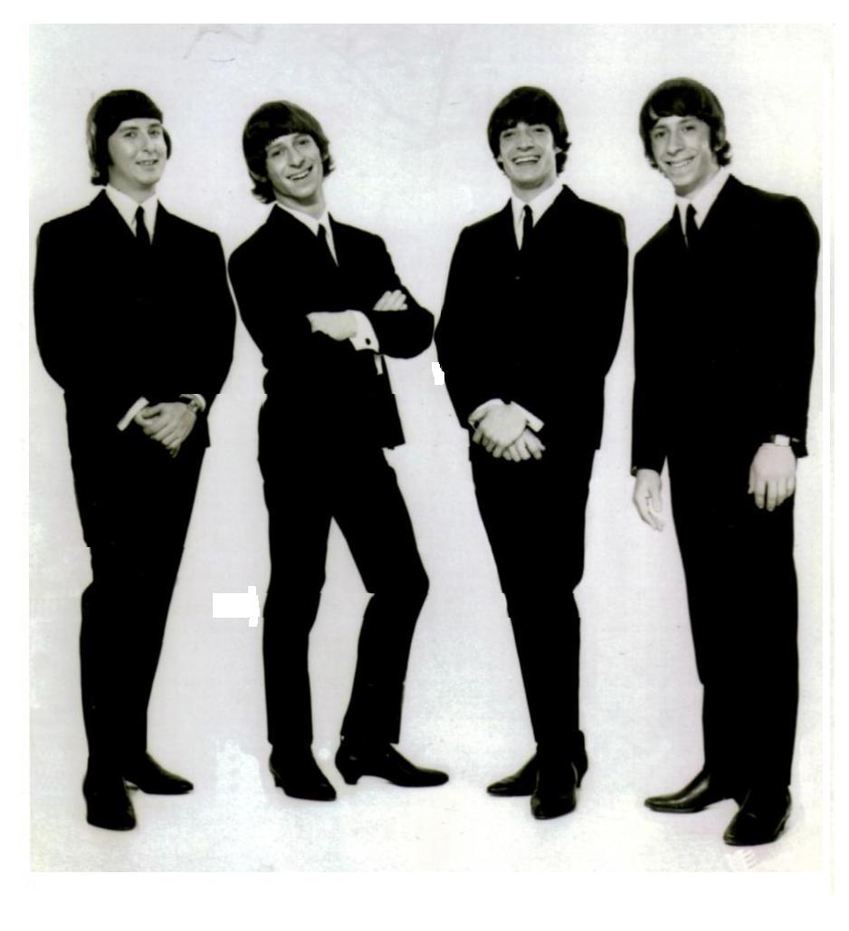 Los Shakers. Foto para el álbum "Rompan Todo (Break it All)" de 1965. Foto tomada en Argentina en 1965.